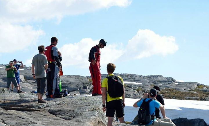 Basehoppere klare til å hoppe fra Nesatindane